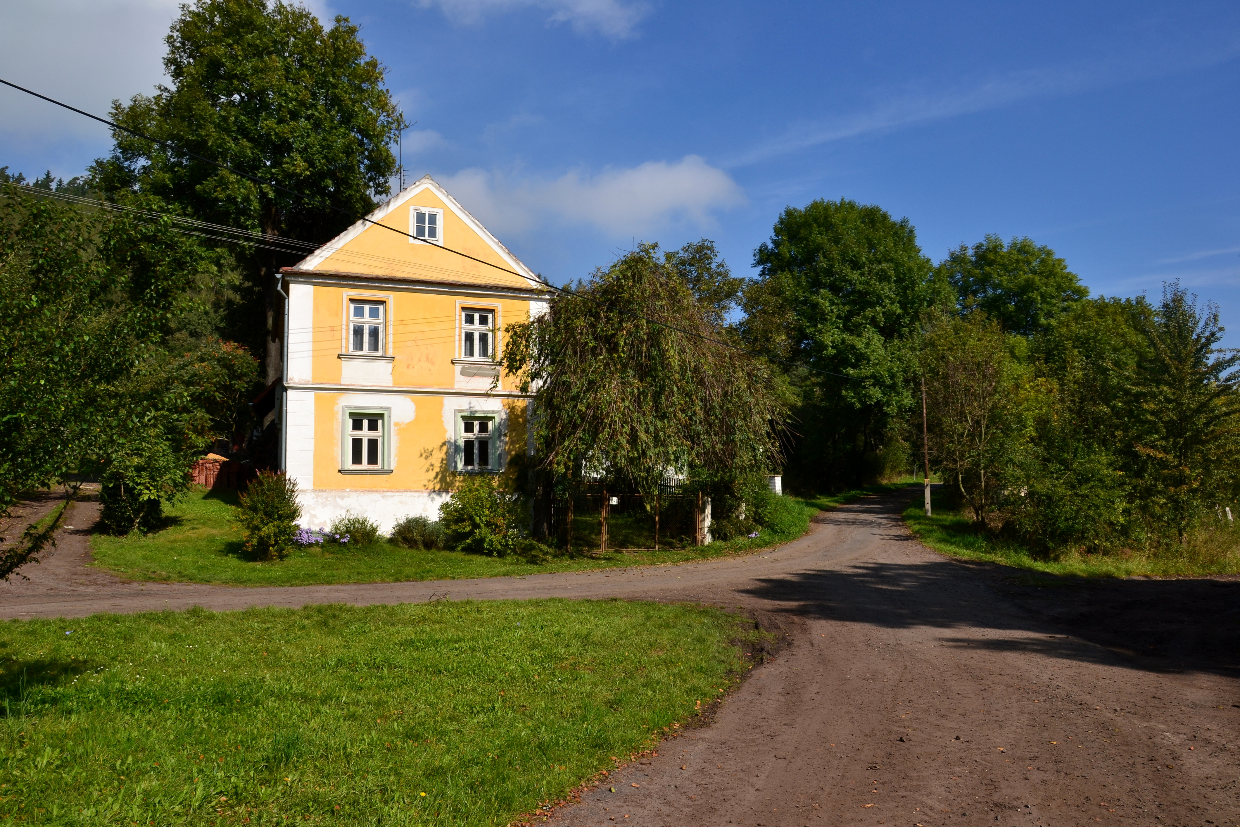 Dětaň - dům na severní straně návsi u vjezdu do osady